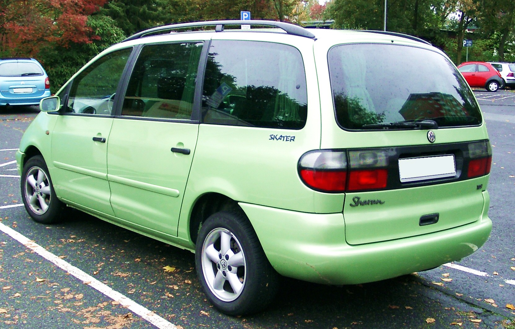 VW Sharan, Sondermodell Skater